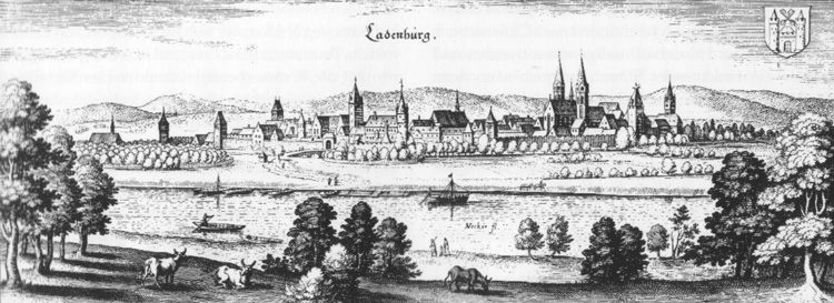 Ladenburg, view by Matthäus Merian